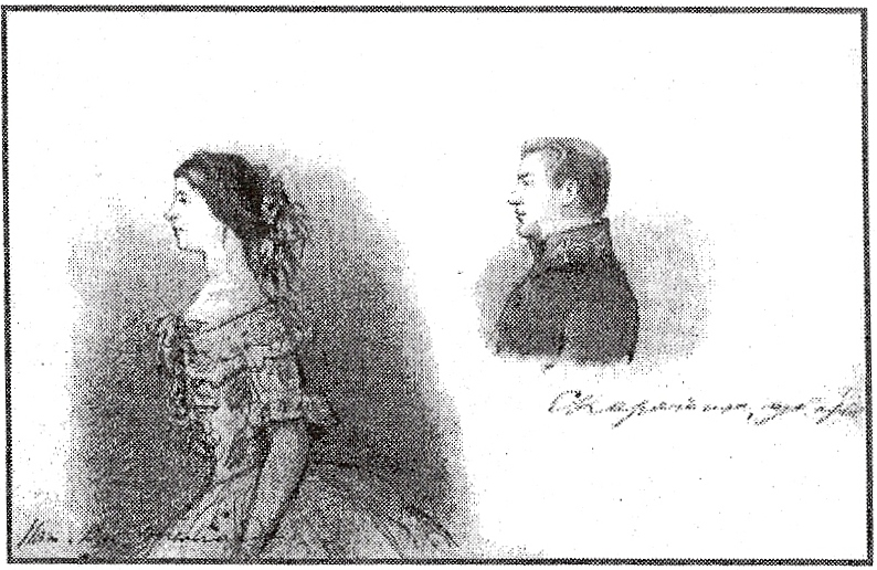 Рисунок из анонимного альбома 1850-х годов с изображением членов окружения орловского губернатора Сафоновича